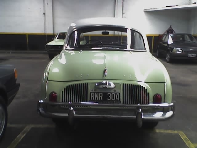 Defensas Traseras en un Dauphine Argentino